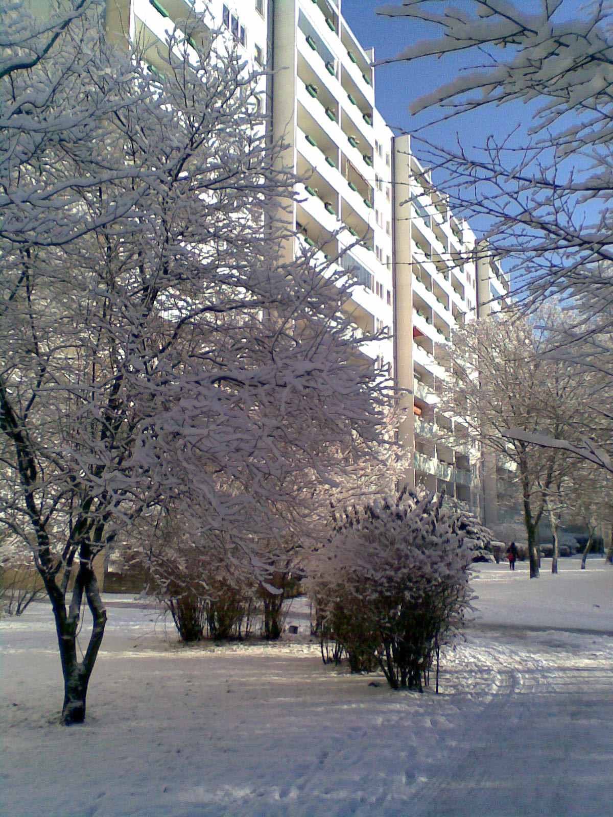 Wohnungsbauserie WPS 70 - erbaut 1977 - Häuser im Winter 2009 - Berlin-Greifswalder Straße